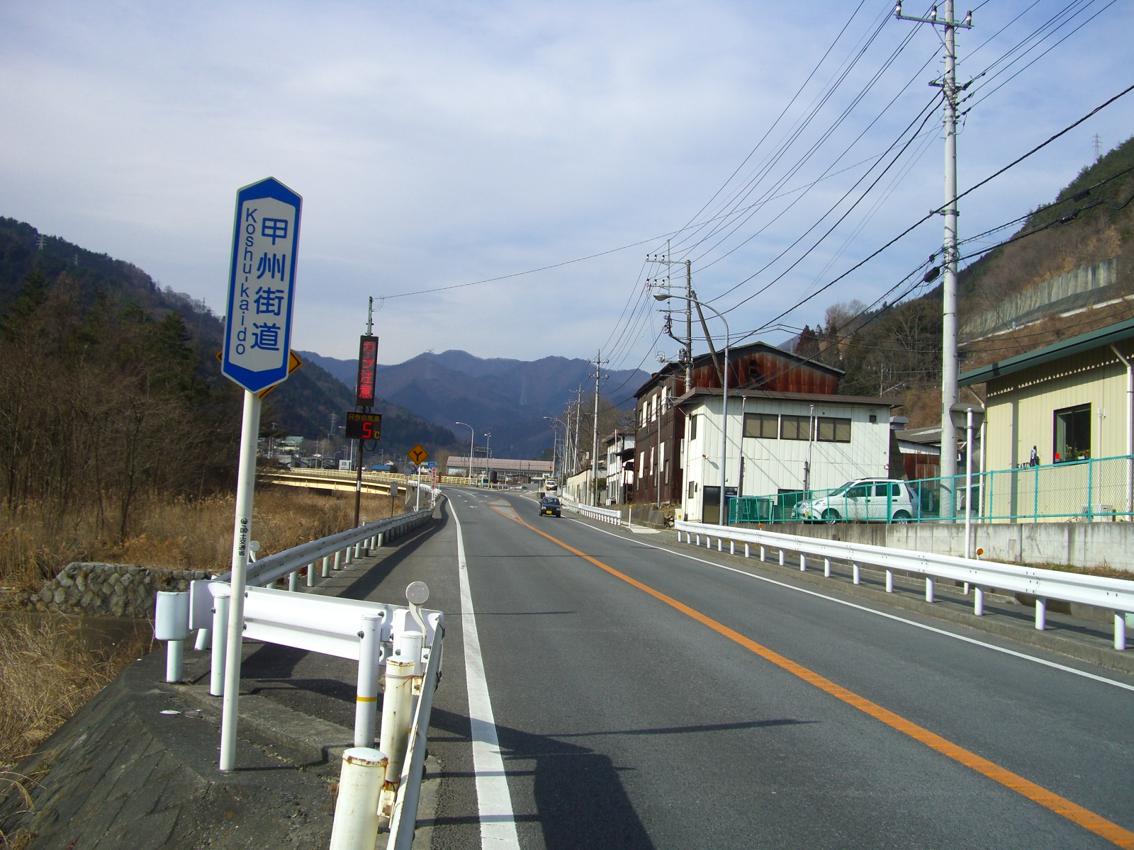 大月市笹子付近 笹子峠が迫る。